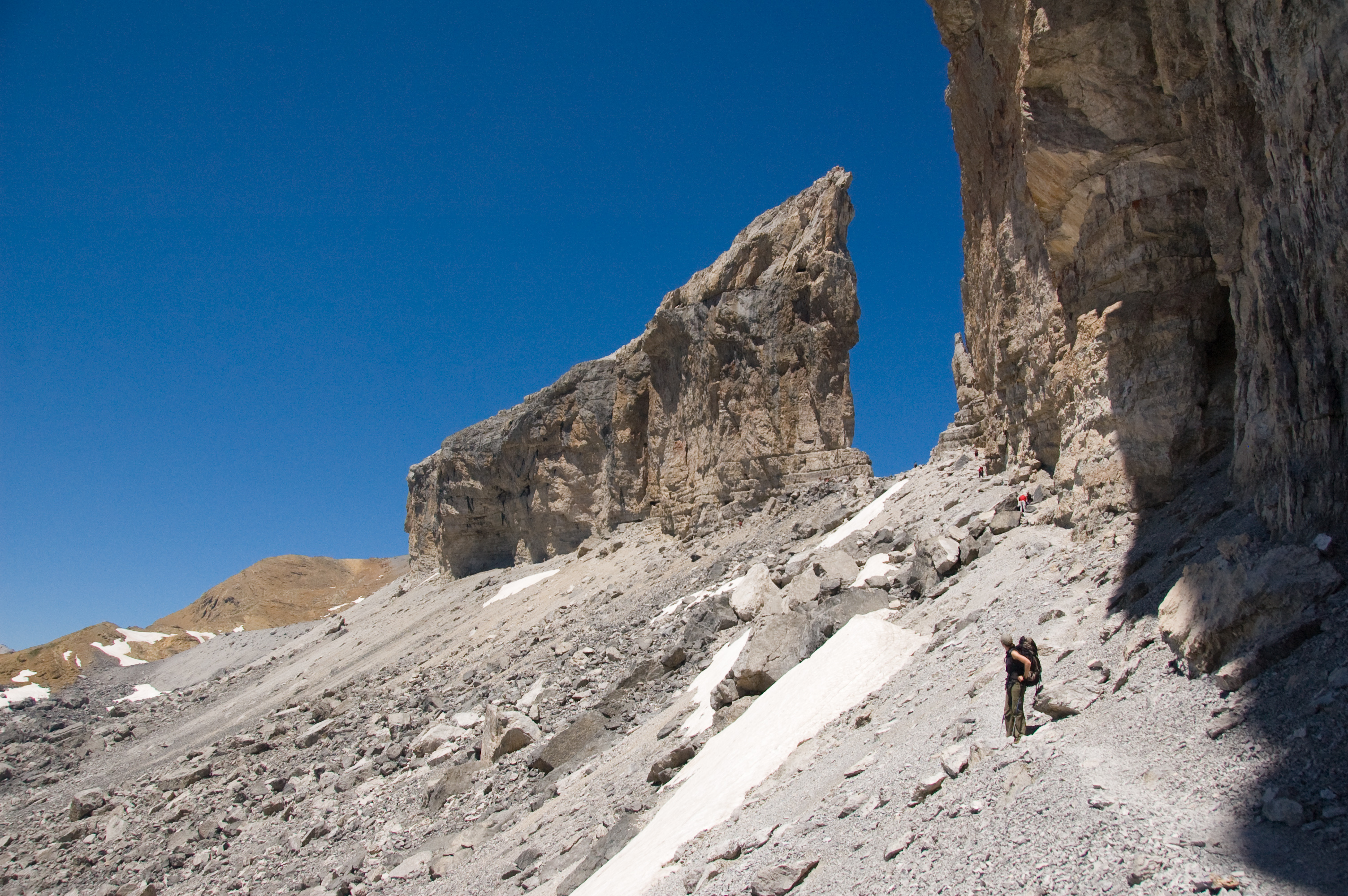 Brèche de Roland dans les Pyrénées